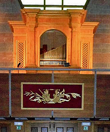 Orgue de l'église paroissiale de Monteaperta, commune de Taipana, province d'Udine, région du Frioul - Vénétie Julienne, photographié le 1er avril 2018.